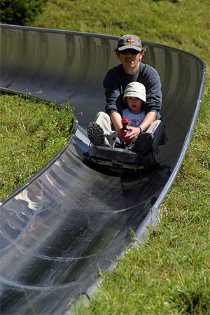 Sommer-Rodelbahn Oeschinensee